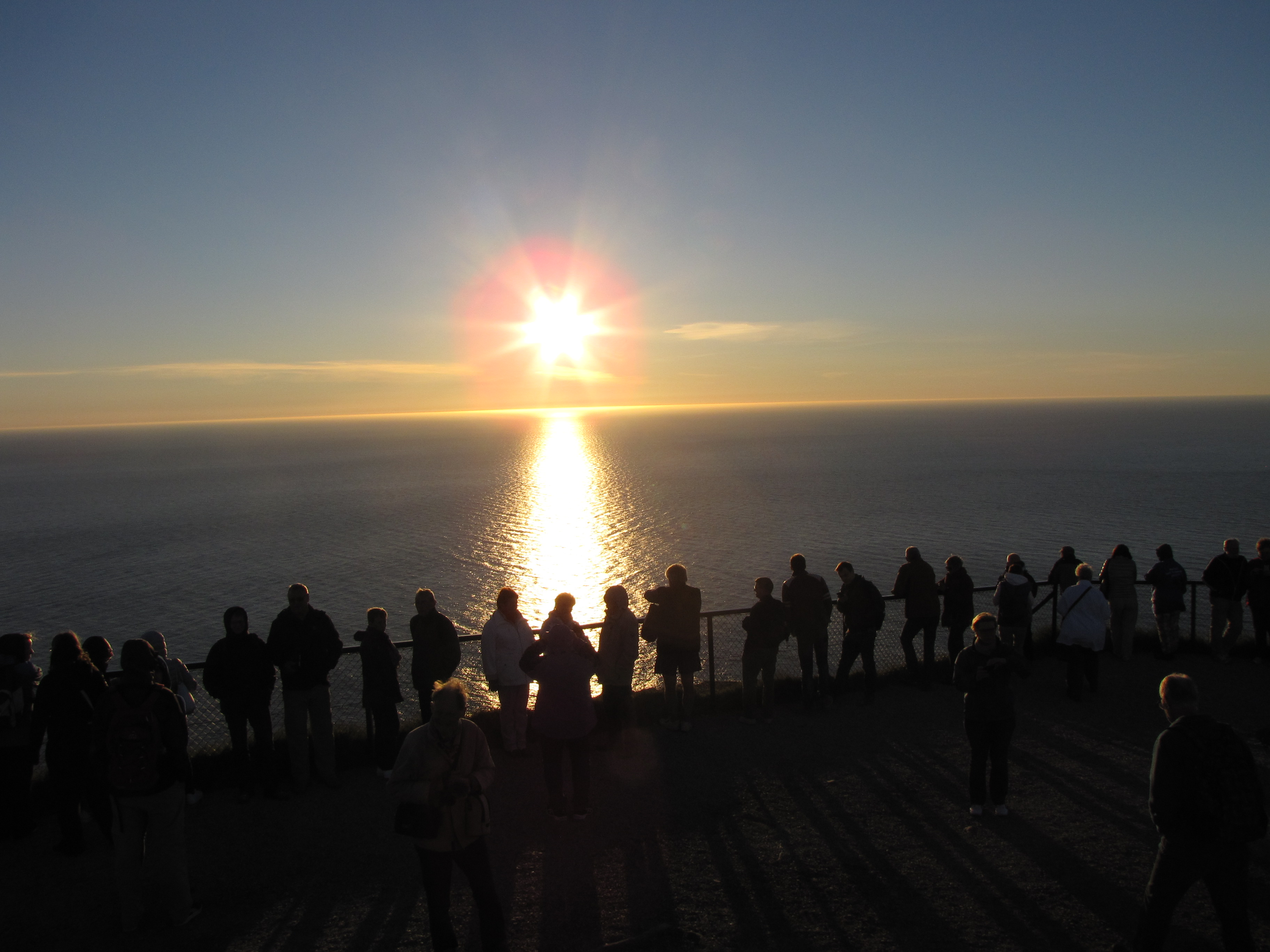 Midnattssol vid Nordkap juli 2014